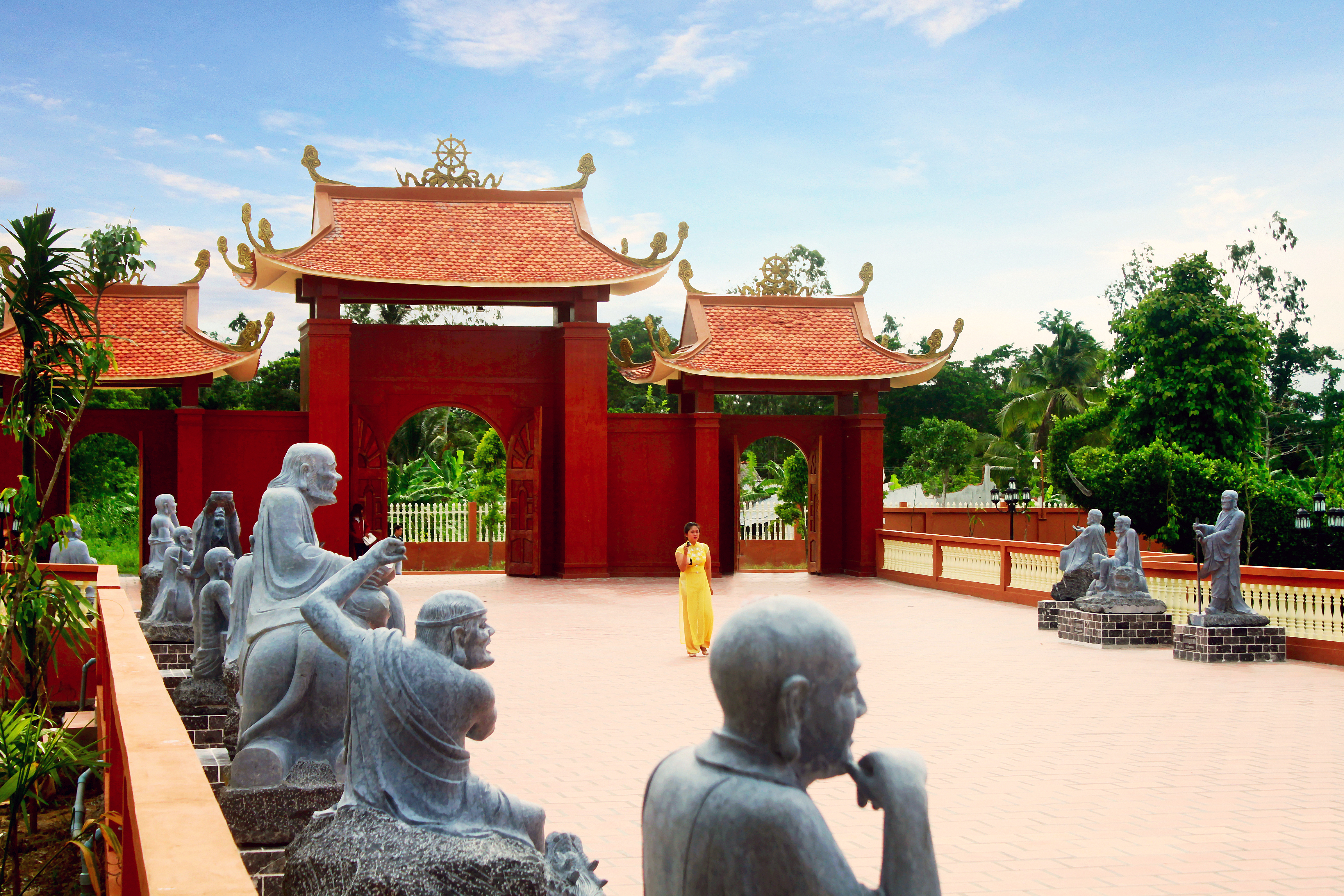 Một số tượng La Hán được đặt ở hai bên lối đi chính dẫn vào chính điện Thiền viện Trúc Lâm Phương Nam ở xã Mỹ Khánh, huyện Phong Điền, thành phố Cần Thơ, Việt Nam.